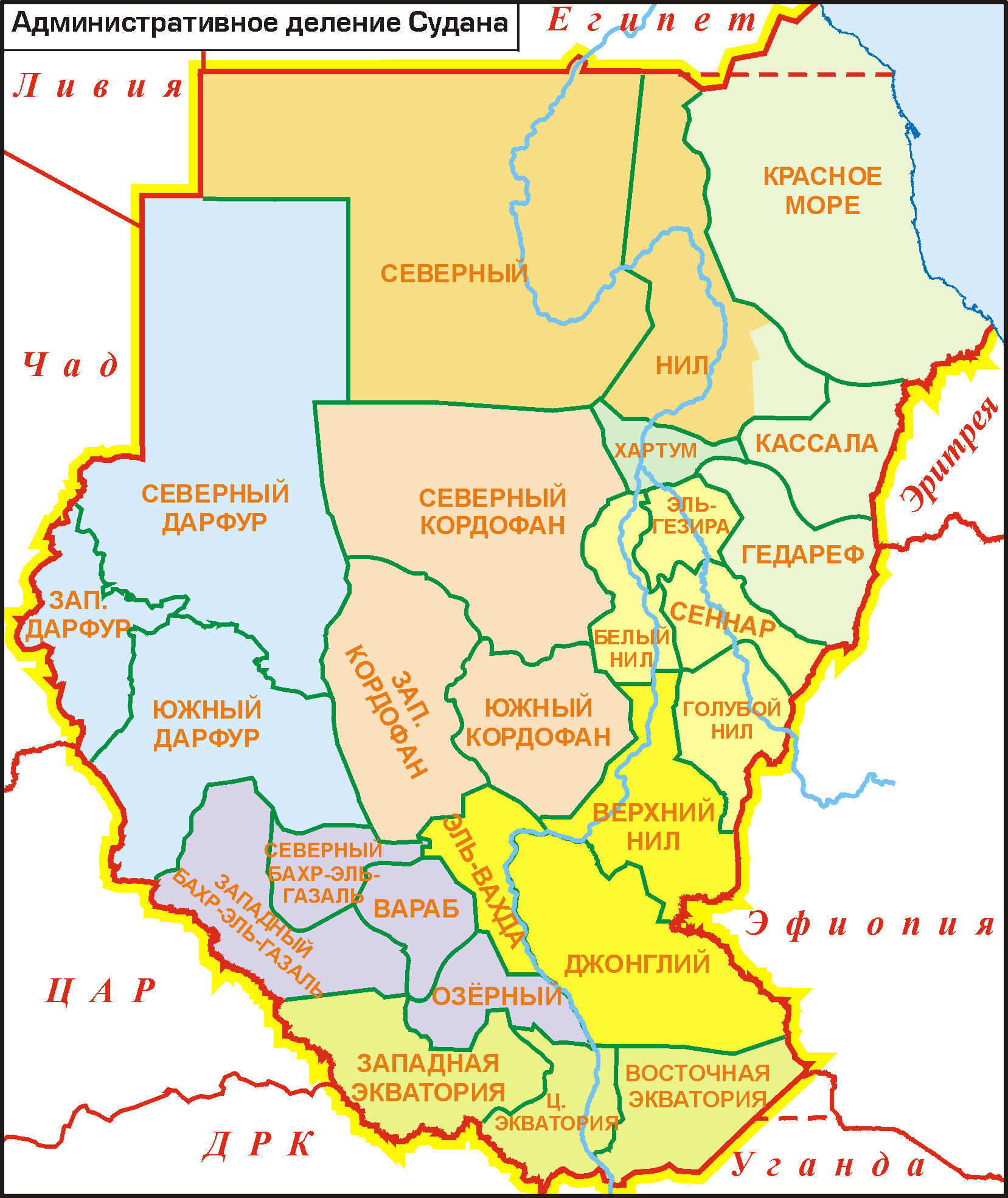 Зелёные границы - штаты Судана с 1994 года. Заливка цветом - регионы Судана до 1994 года.